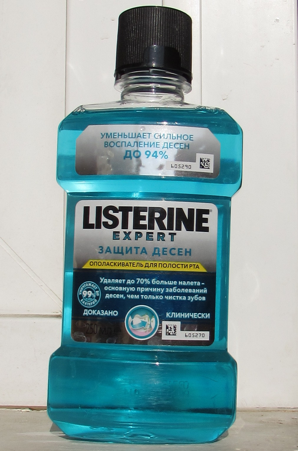 Listerine Expert: защита дёсен, Россия, 2014 г.